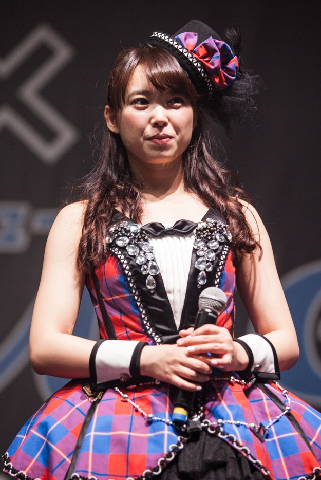 Berryz Kobo x °C-ute